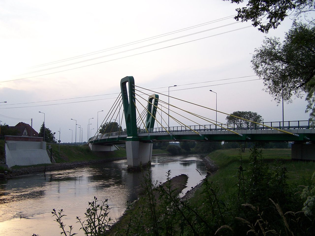 Bridge in Skorodoszcz